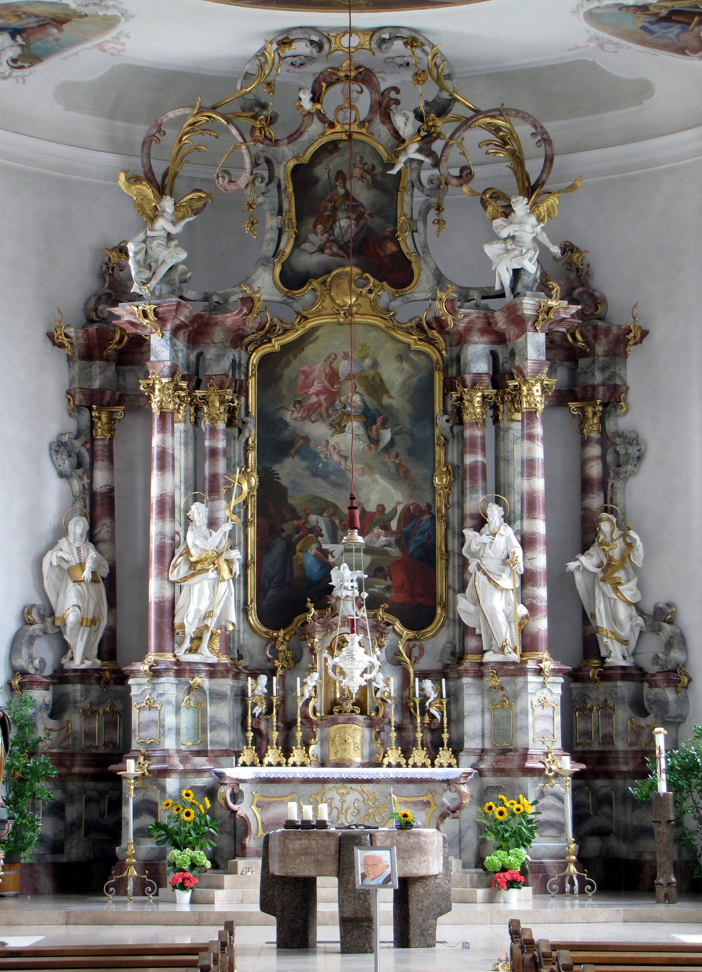 Hochaltar der Kirche in Eglofs von Johann Richard Eberhart, 1780